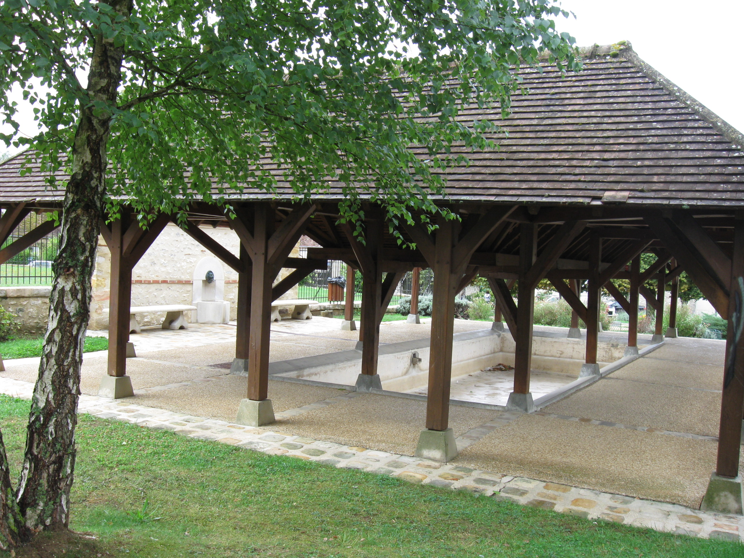 Lavoir de Valence-en-Brie. (Seine-et-Marne, région Île-de-France).